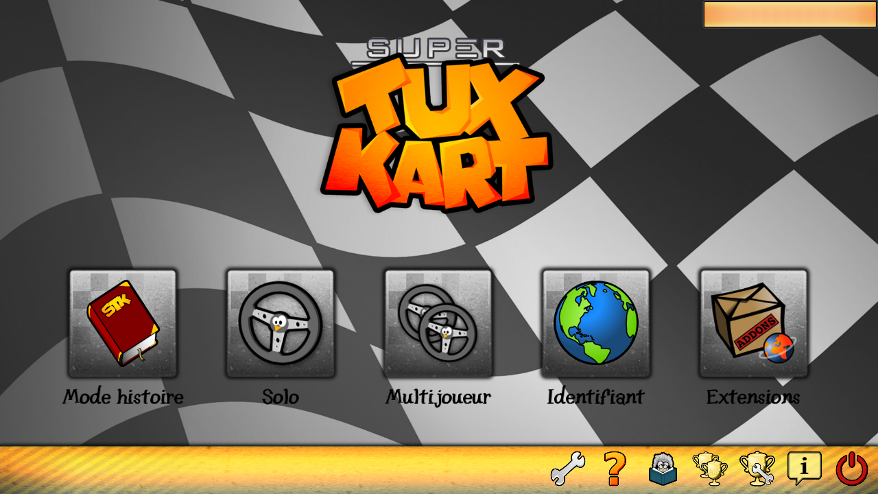 L'écran d'accueil de STK.